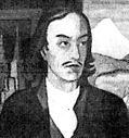 Engelbert Kaempfer